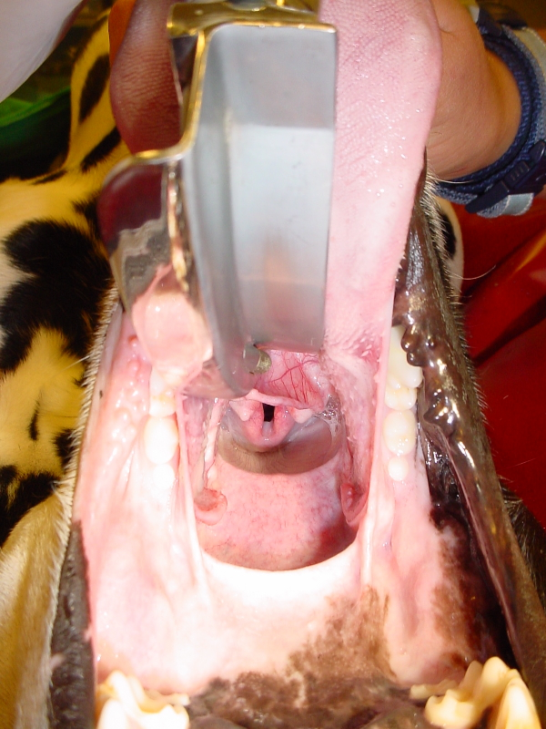 Hund, Kehlkopf mit Laryngoskop dargestellt